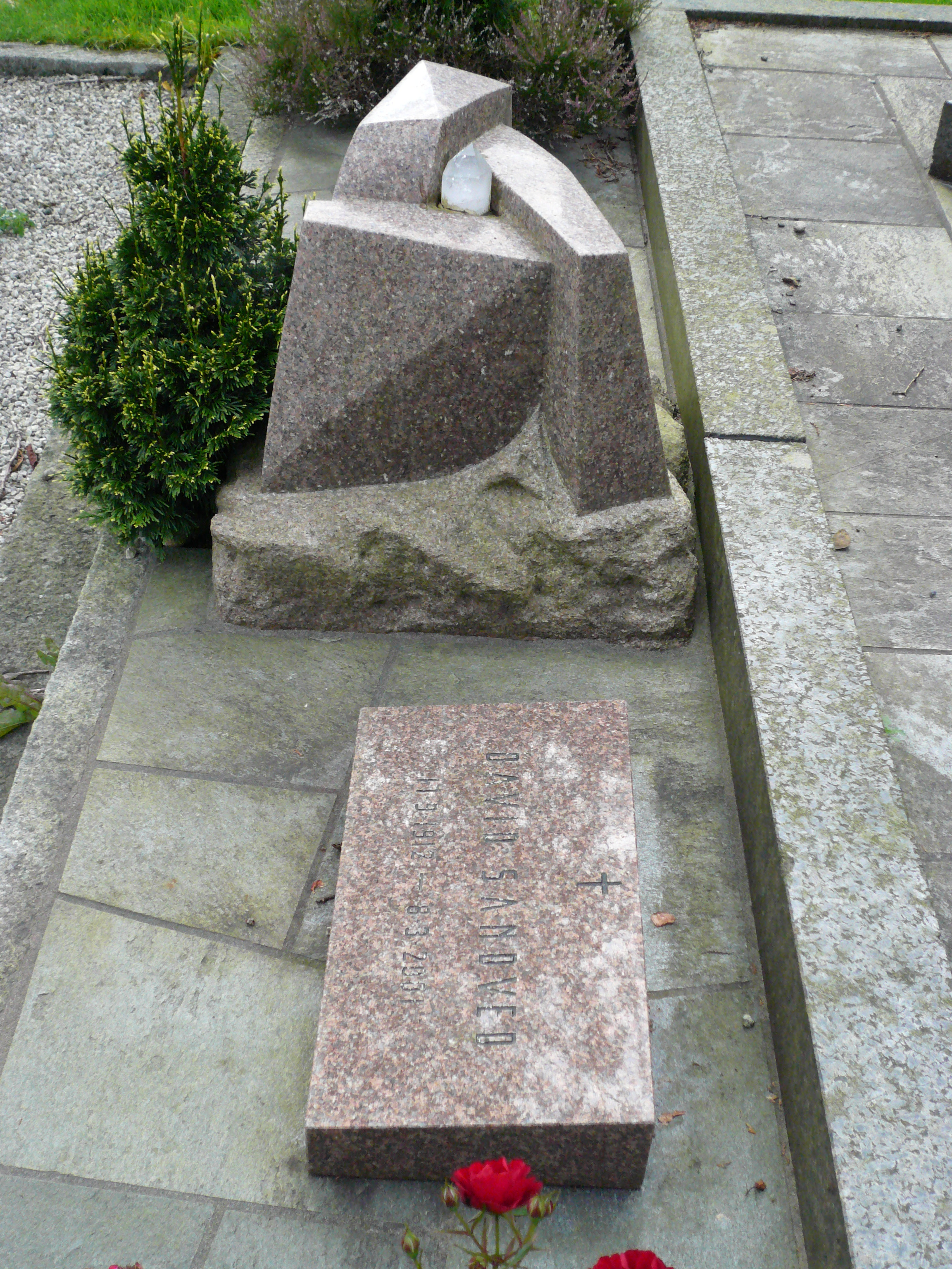 David Sandveds grav på Christine Elisabeth Gravlund i Haugesund. Minnesteinen er formgitt av arkitekt Sandved og hugget av Ivar Rudi.